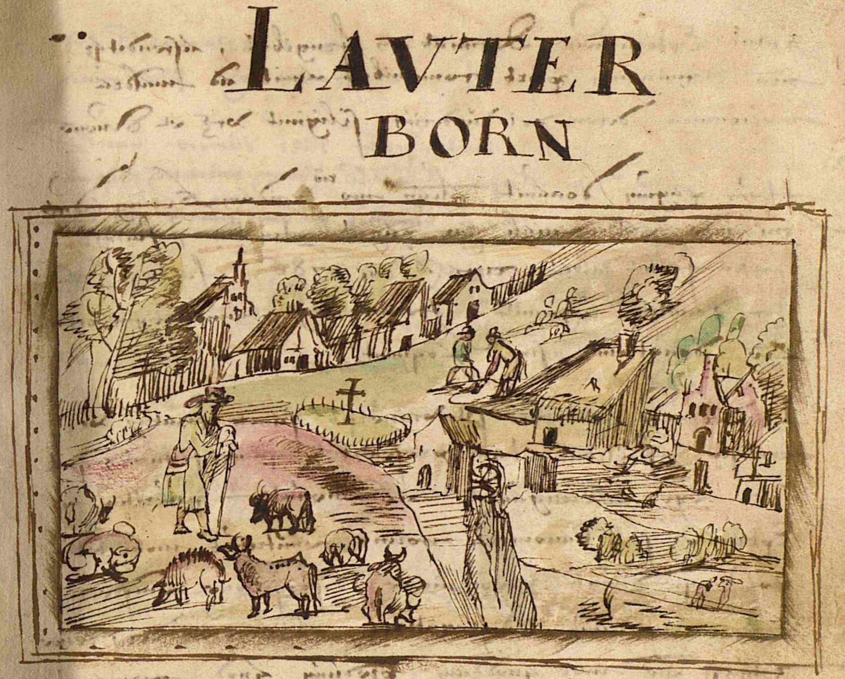 "Lauterborn" par Jean Bertels, Registre des biens de l'abbaye Saint-Willibrord d'Echternach